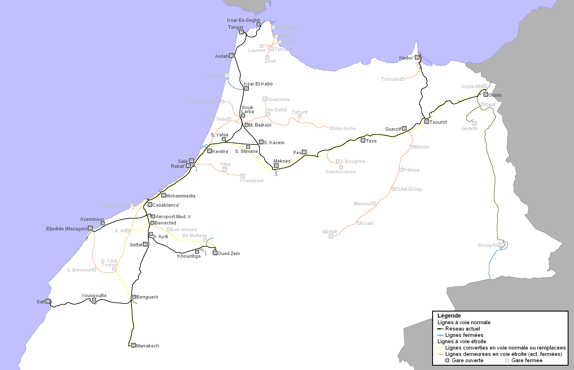 Carte historique des lignes ferroviaires à voie étroite (600mm et 1000mm) du Maroc. Carte basée sur Rail network in Morocco.svg, mise en ligne par l'utilisateur Tachfin.